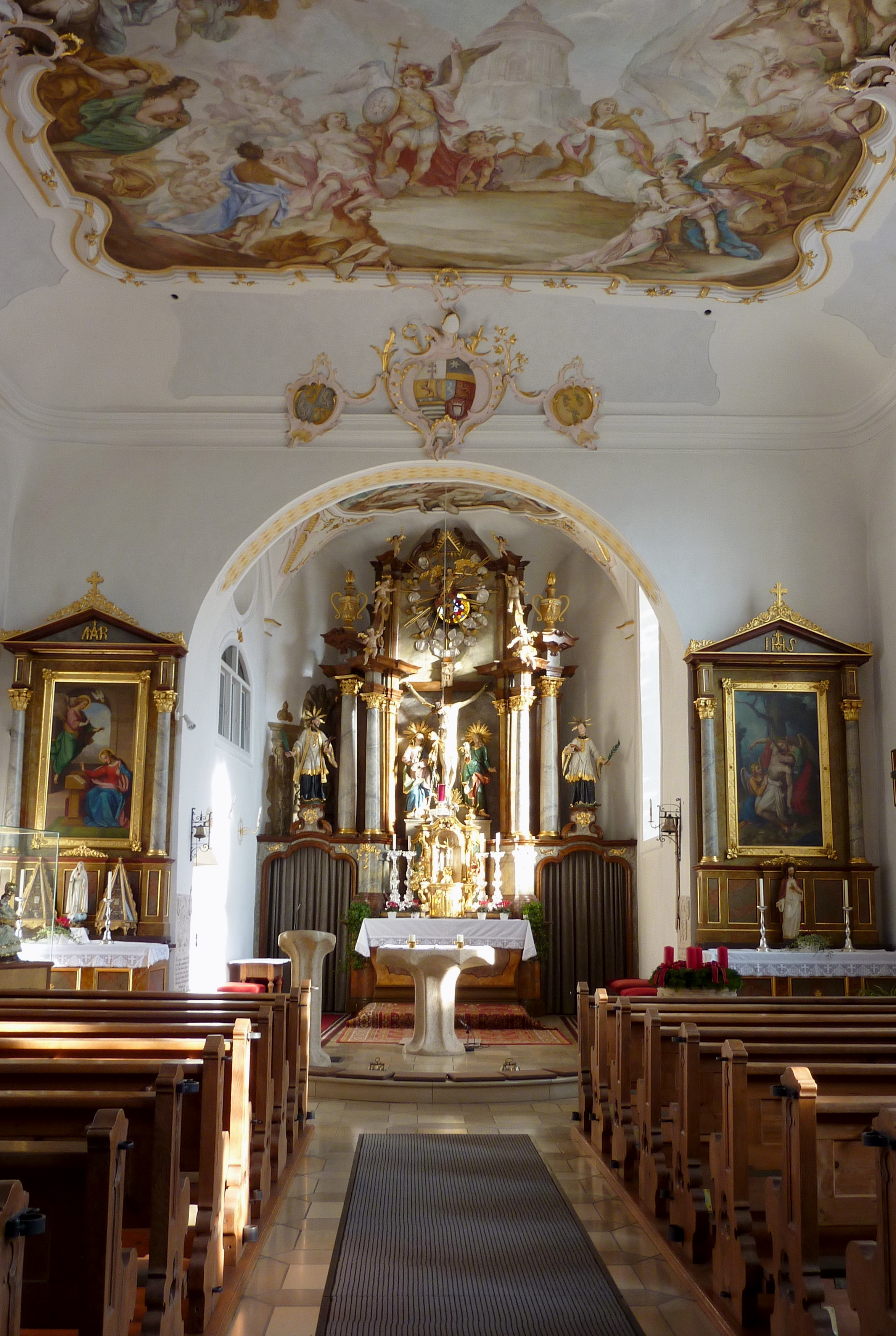 Katholische Pfarrkirche St. Michael in Oberbechingen, einem Ortsteil der Gemeinde Bachhagel im Landkreis Dillingen an der Donau (Bayern), Innenraum mit Blick zum Chor